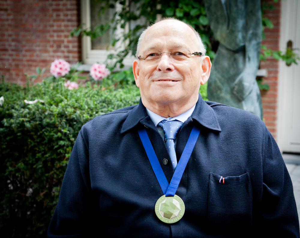 Remise de la médaille décernée par l'association Universitas21 2014 à Mr Domenico Lenarduzzi pour avoir crée et développé le programme Socrates, devenu Erasmus.